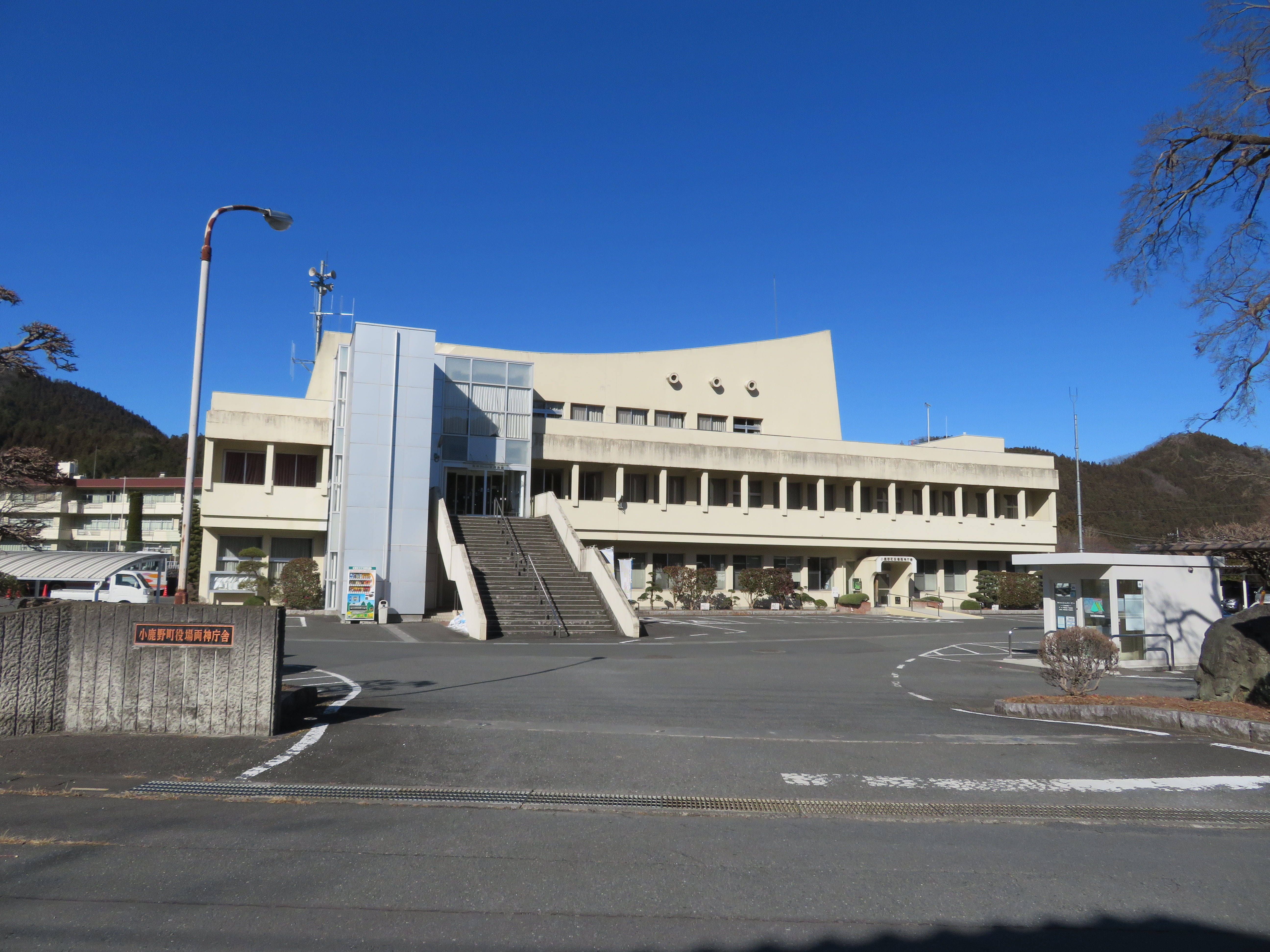 小鹿野町役場両神庁舎（旧両神村役場）